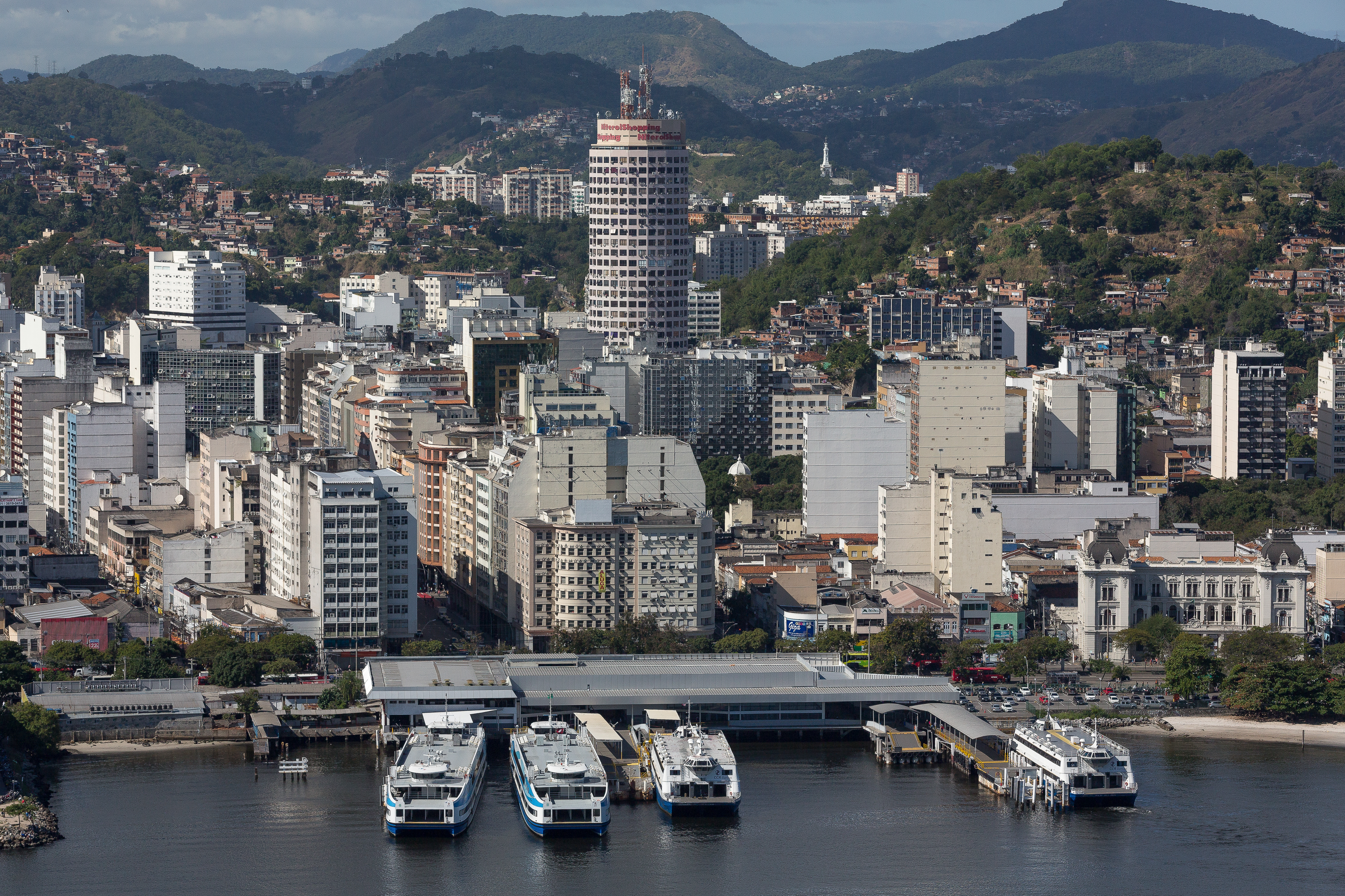 Vista aérea da Estação Praça Arariboia, uma das estações de barcas de Niterói. RJ - Brasil.